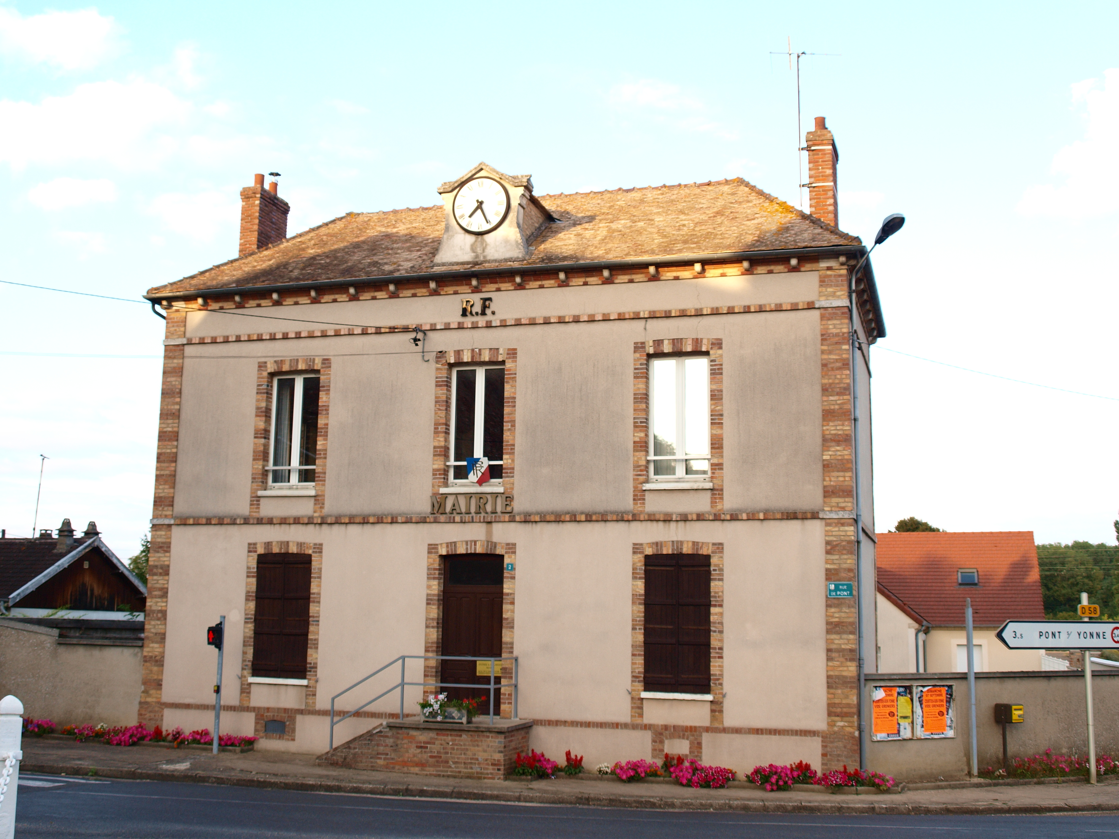 Villeperrot (Yonne, France) ; la mairie.